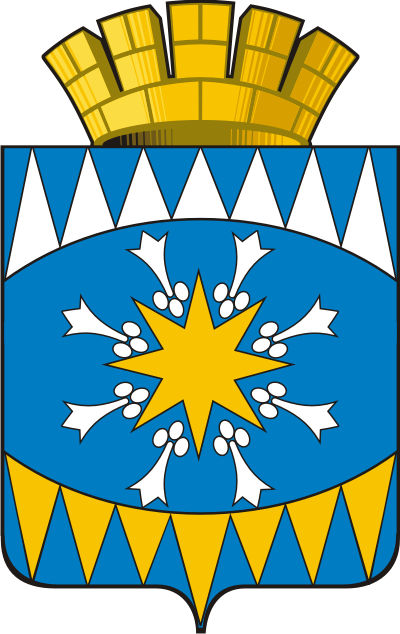 Герб города Ивдель